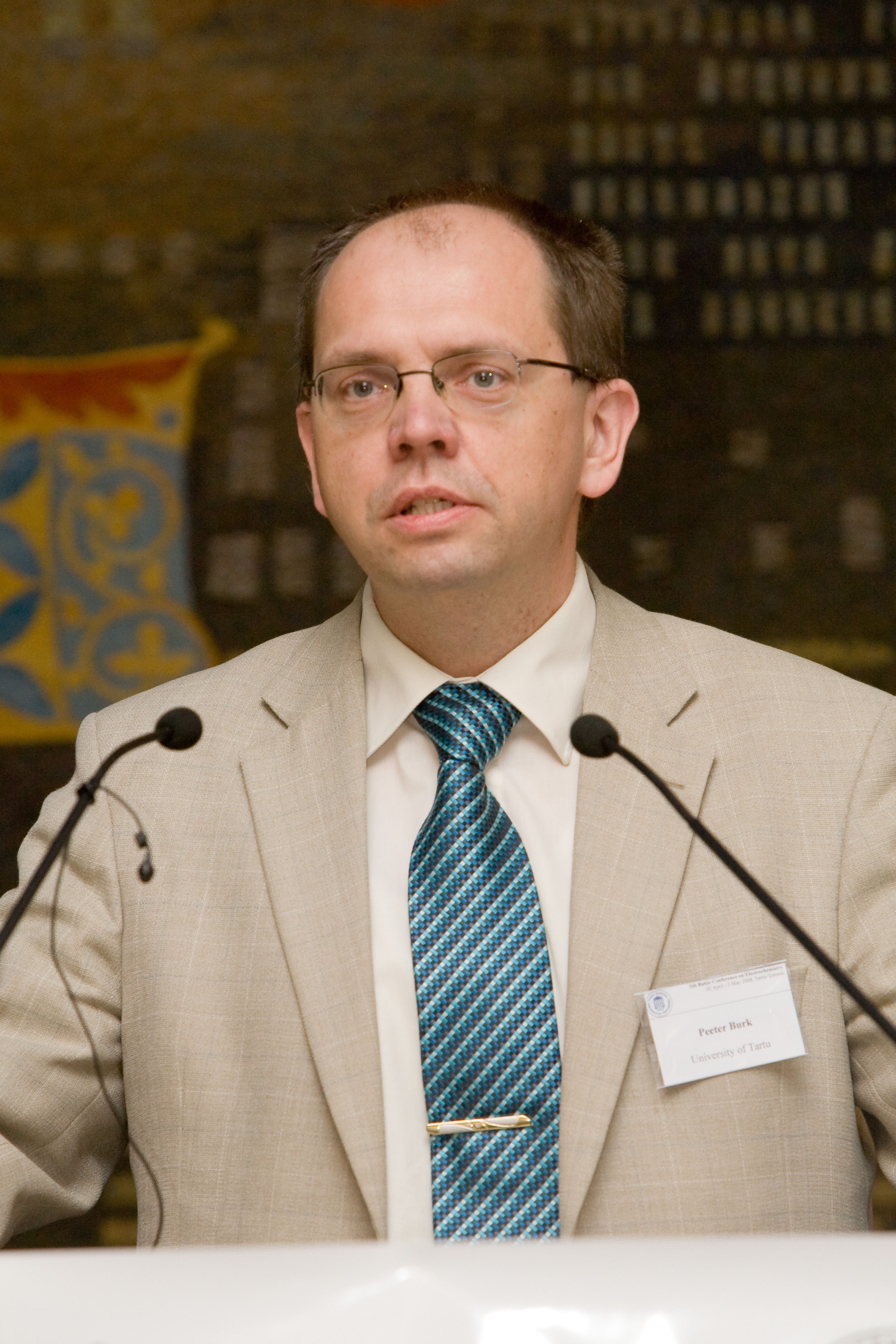 TÜ füüsika-keemiateaduskonna dekaan professor Peeter Burk esinemas rahvusvahelise V Balti elektrokeemia konverentsil (BEC-5). Konverentsi 1. päev.